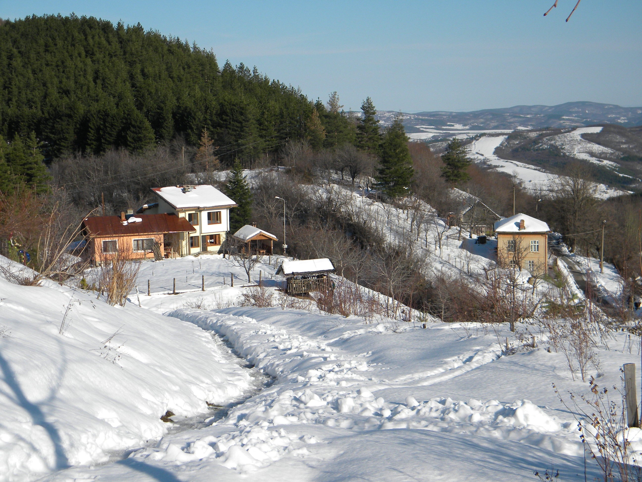 общ изглед спирка Бъзовец